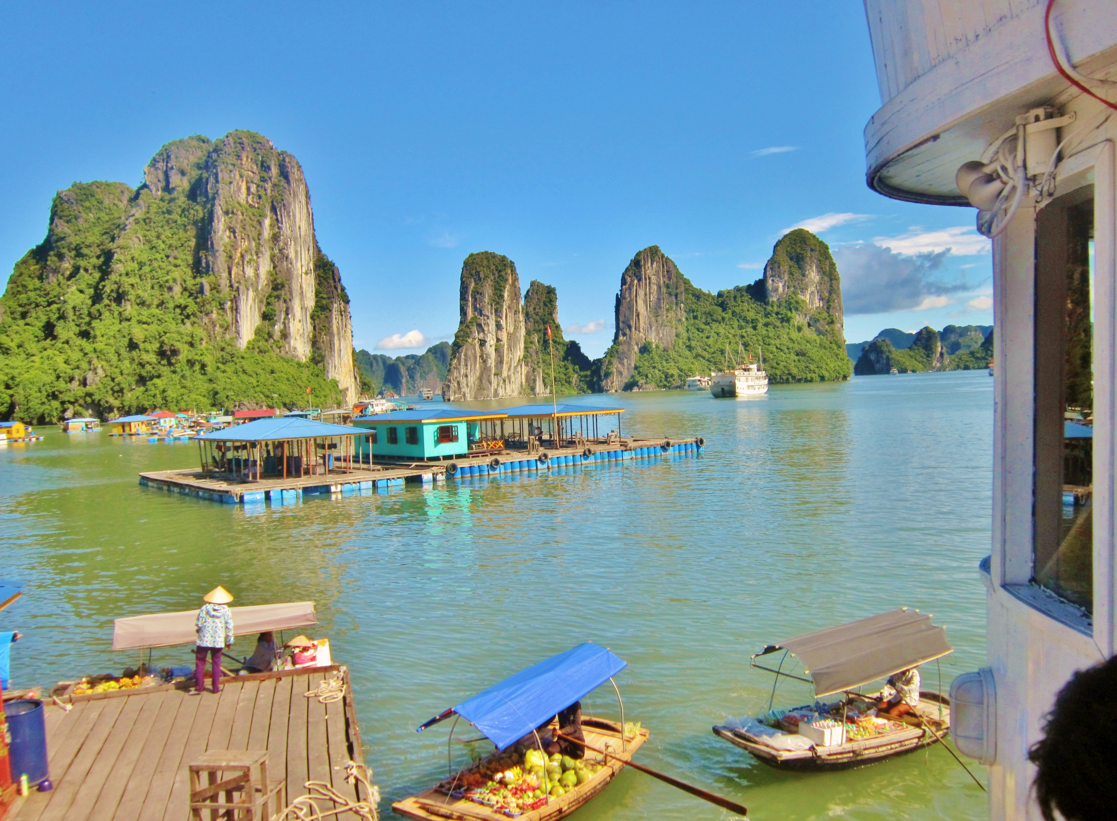 Fishing Village in Ha Long Bay, Vietnam